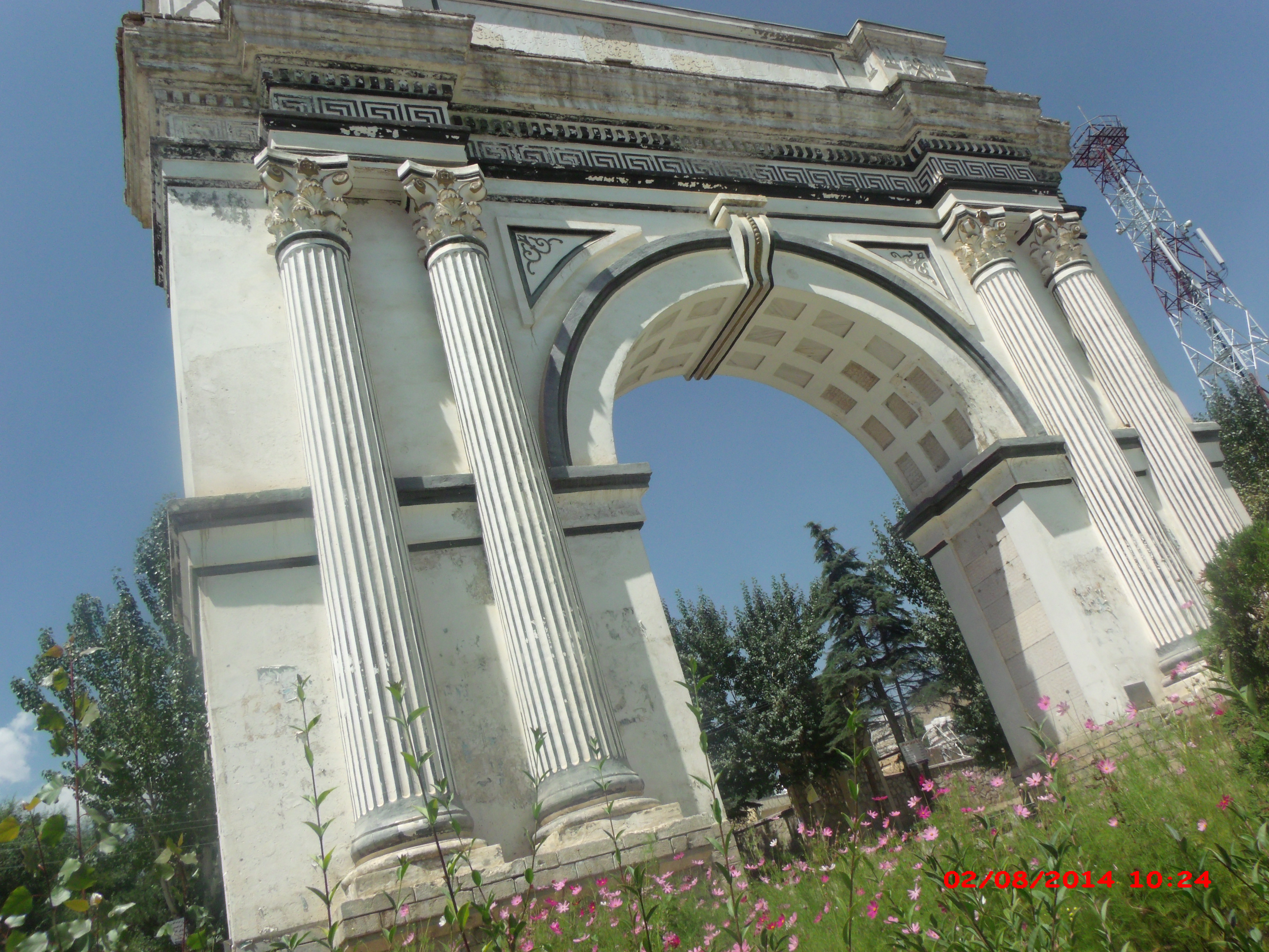 Das ist der Triumphbogen in Paghman,Afghanistan.Er wurde unter Amanullah Khan nach der Unabhängigkeit Afghanistans 1919 gebaut.